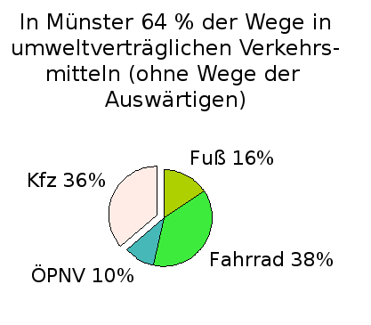 In Münster 64 % der Wege in umweltverträglichen Verkehrsmitteln (ohne Wege der Auswärtigen). Die Zahlen beruhen auf